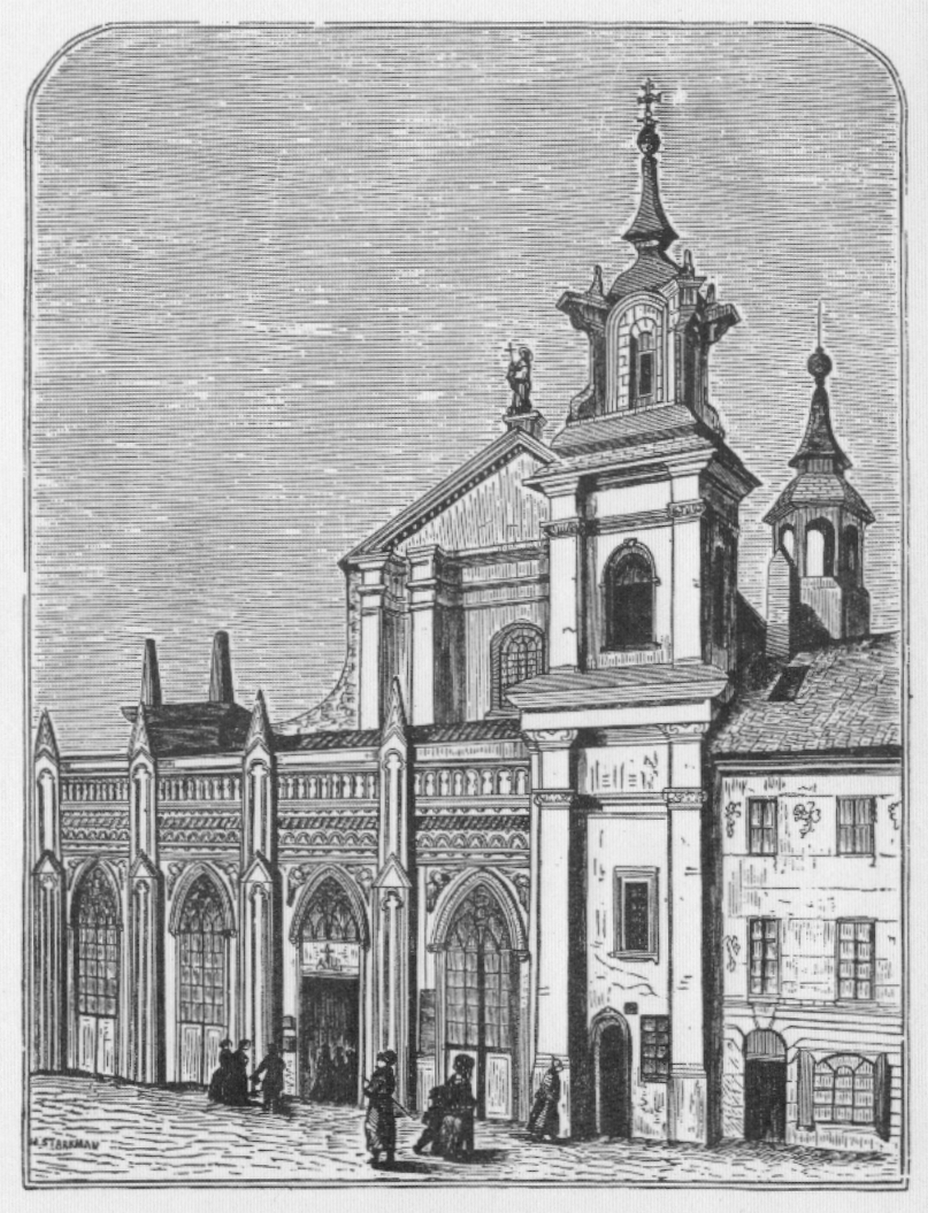 Kościół św. Jacka na ul. Freta w Warszawie (oo. Dominikanów)